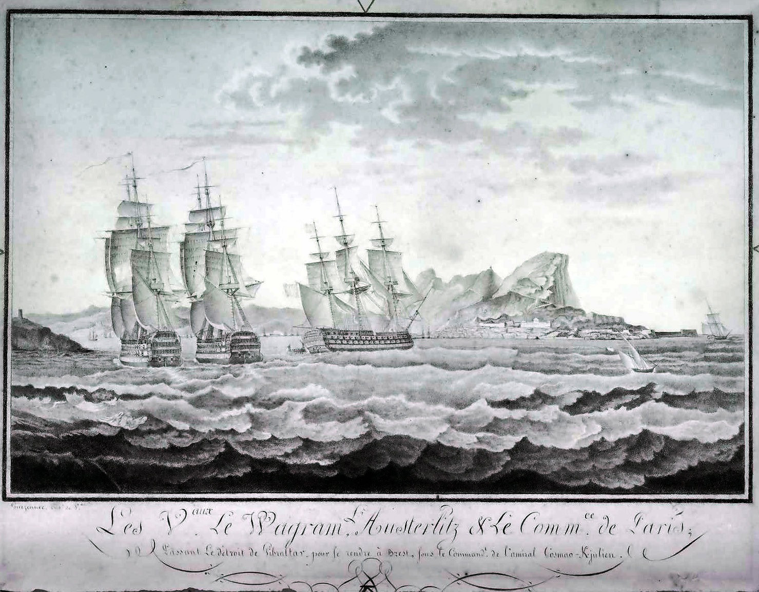 Les vaisseaux Le Wagram (vaisseau amiral), l'Austerlitz et le Commerce de Paris passant le détroit de Gibraltar pour se rendre à Brest sous le commandement de l'amiral Cosmao-Kerjulien (septembre 1814)